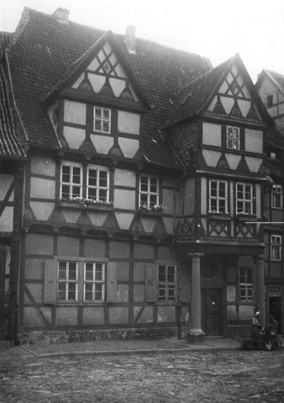 Quedlinburg, Fachwerkhaus Zentralbild Schnae Bend-Ho. 9.9.1952 UBz: Quedlinburg (Prov. Sachsen) Das Geburtshaus von Klopstock.